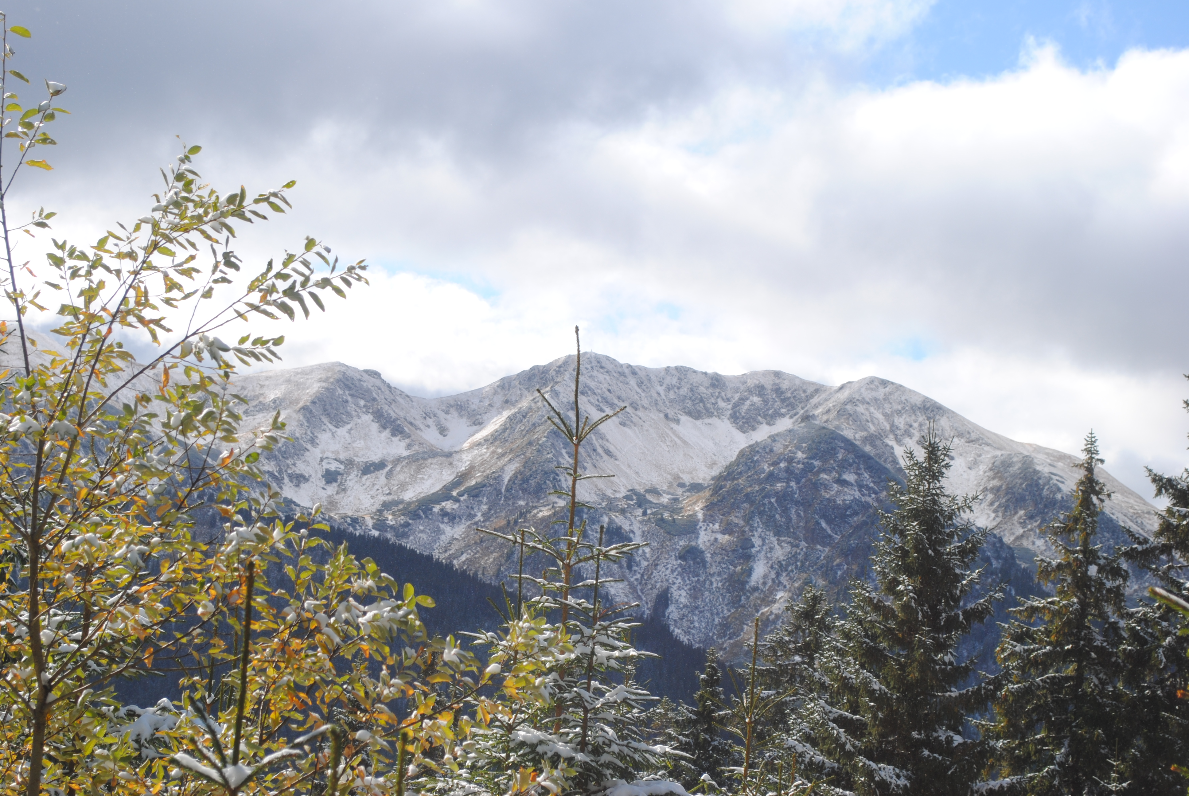 Карпатський біосферний заповідник, Рахівський, Тячівський, Хустський, Виноградівський райони